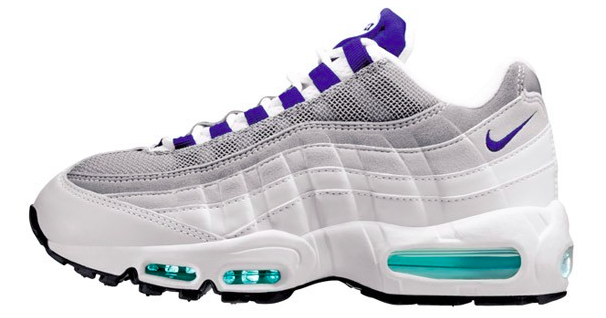 Nike Air Max '95